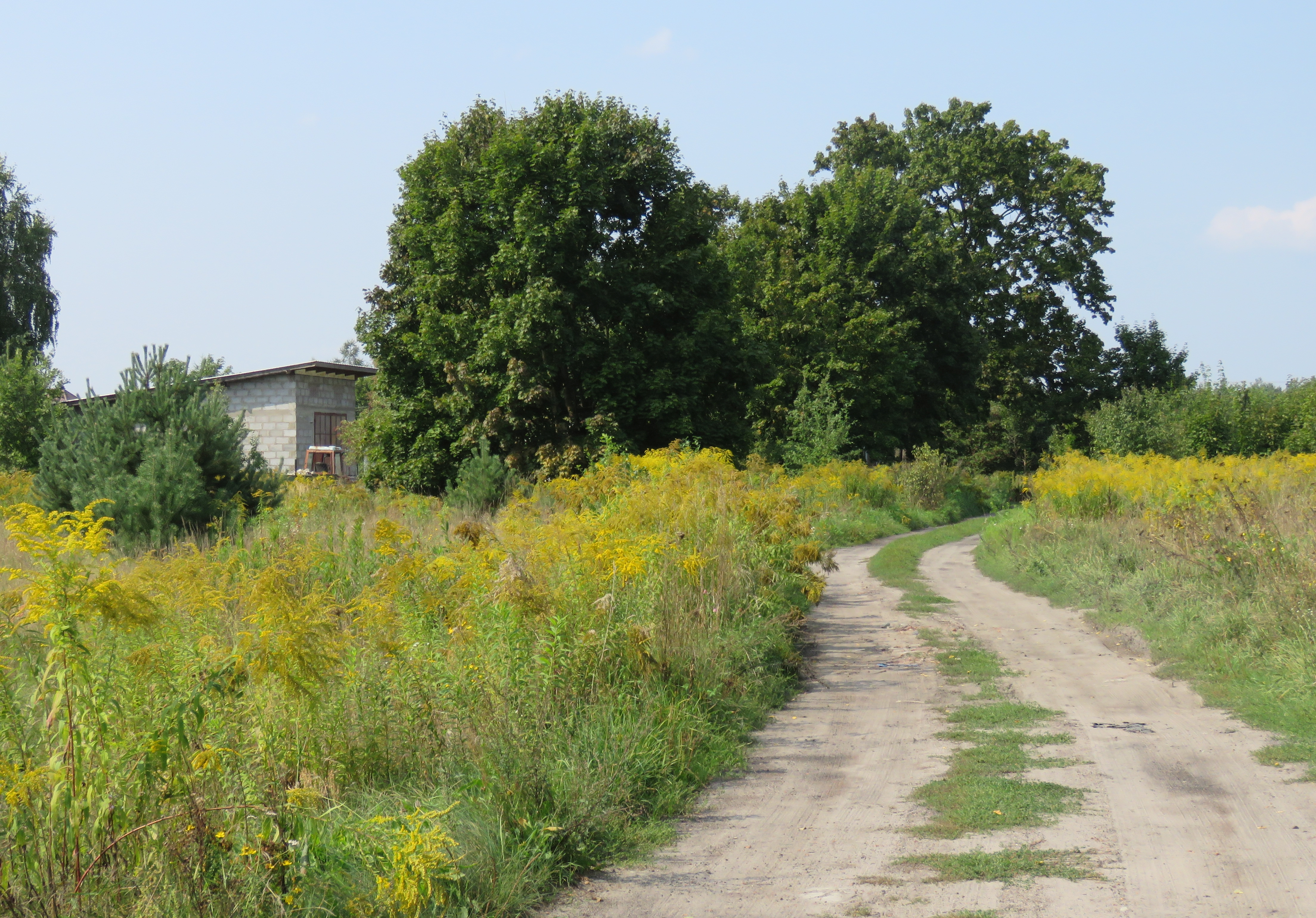 Korfowe gm. Leszno